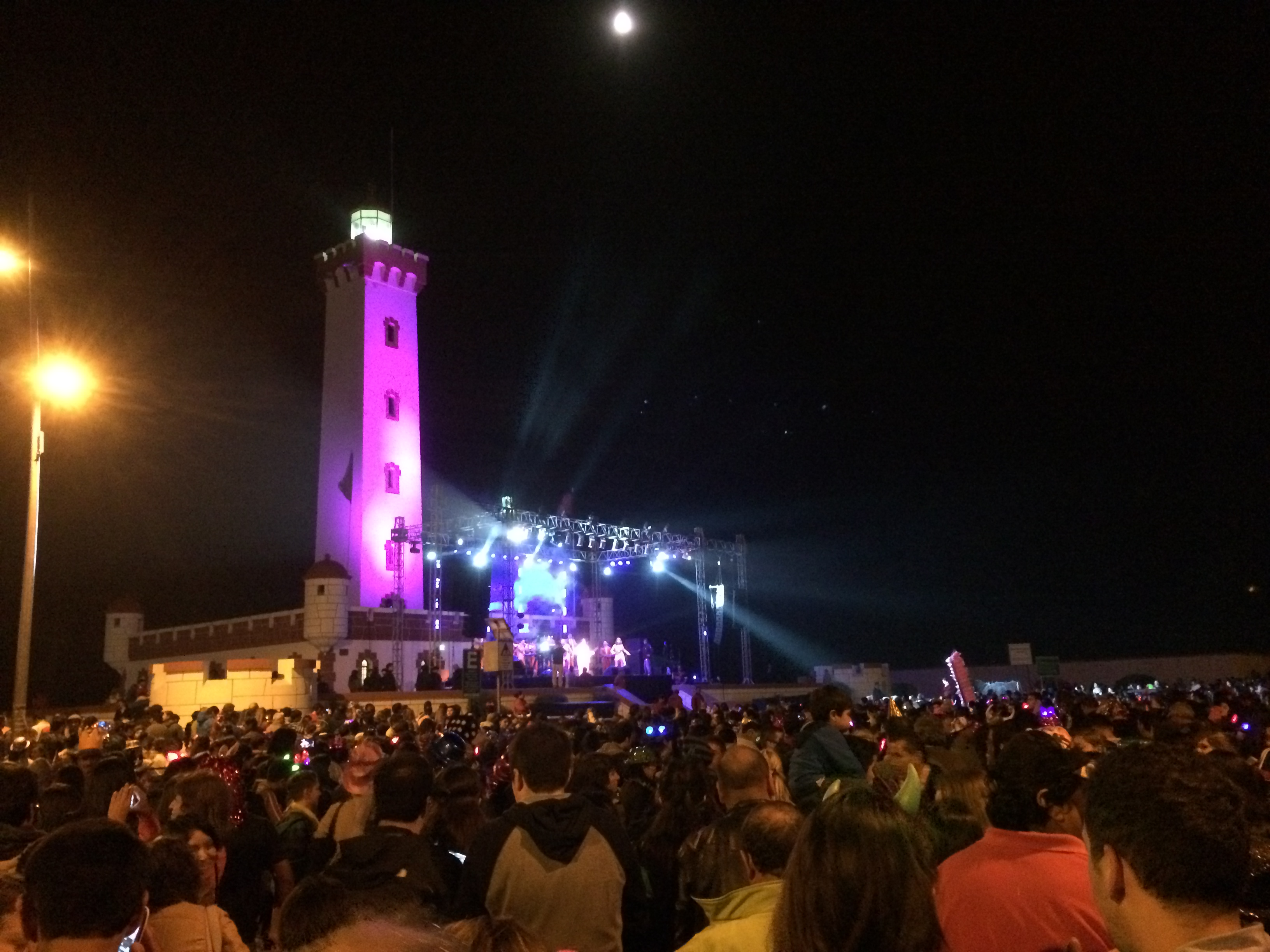 Fiesta del Año Nuevo en el foro de la serena, Chile.